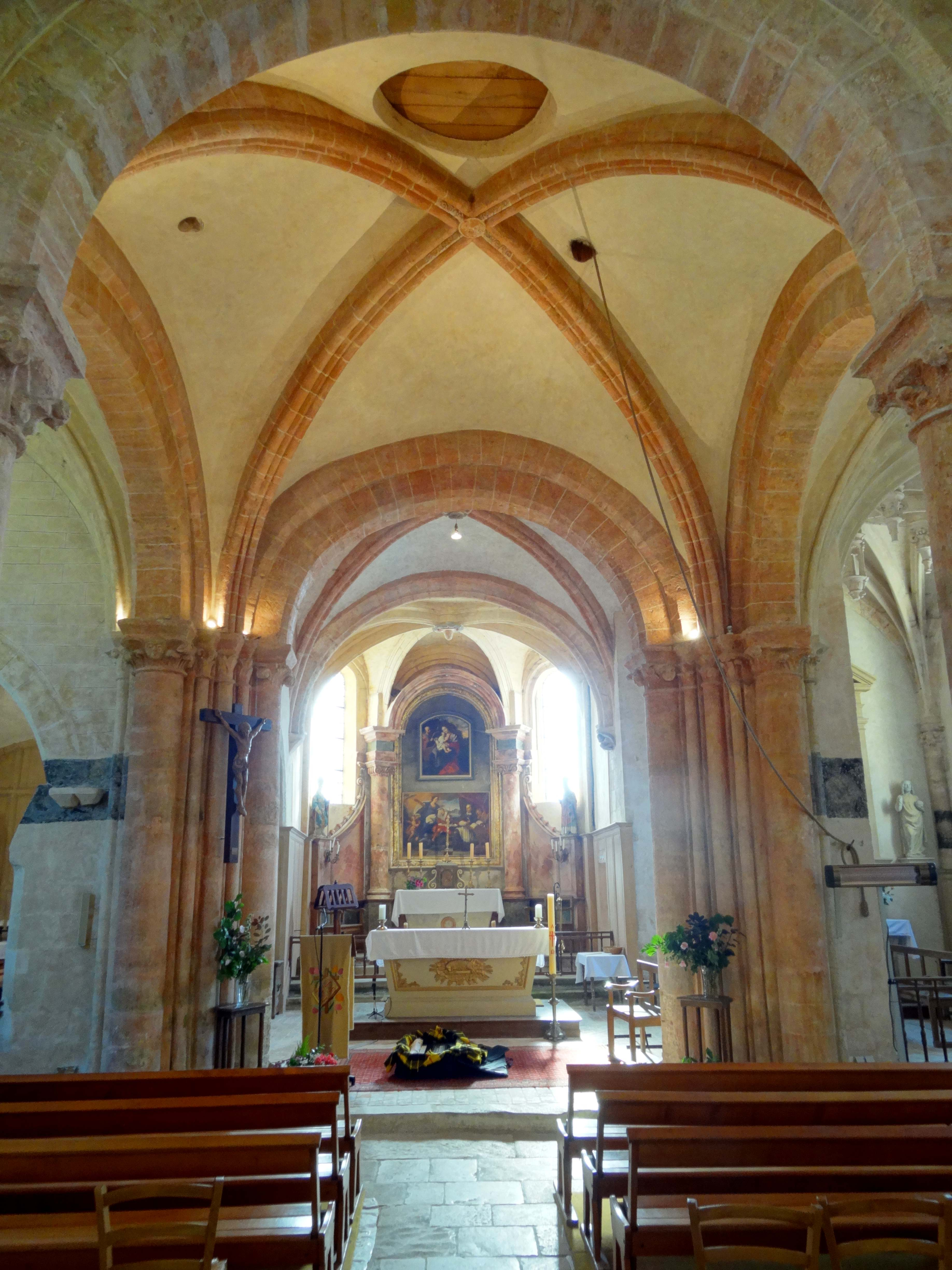 Intérieur de l'église - voir titre.